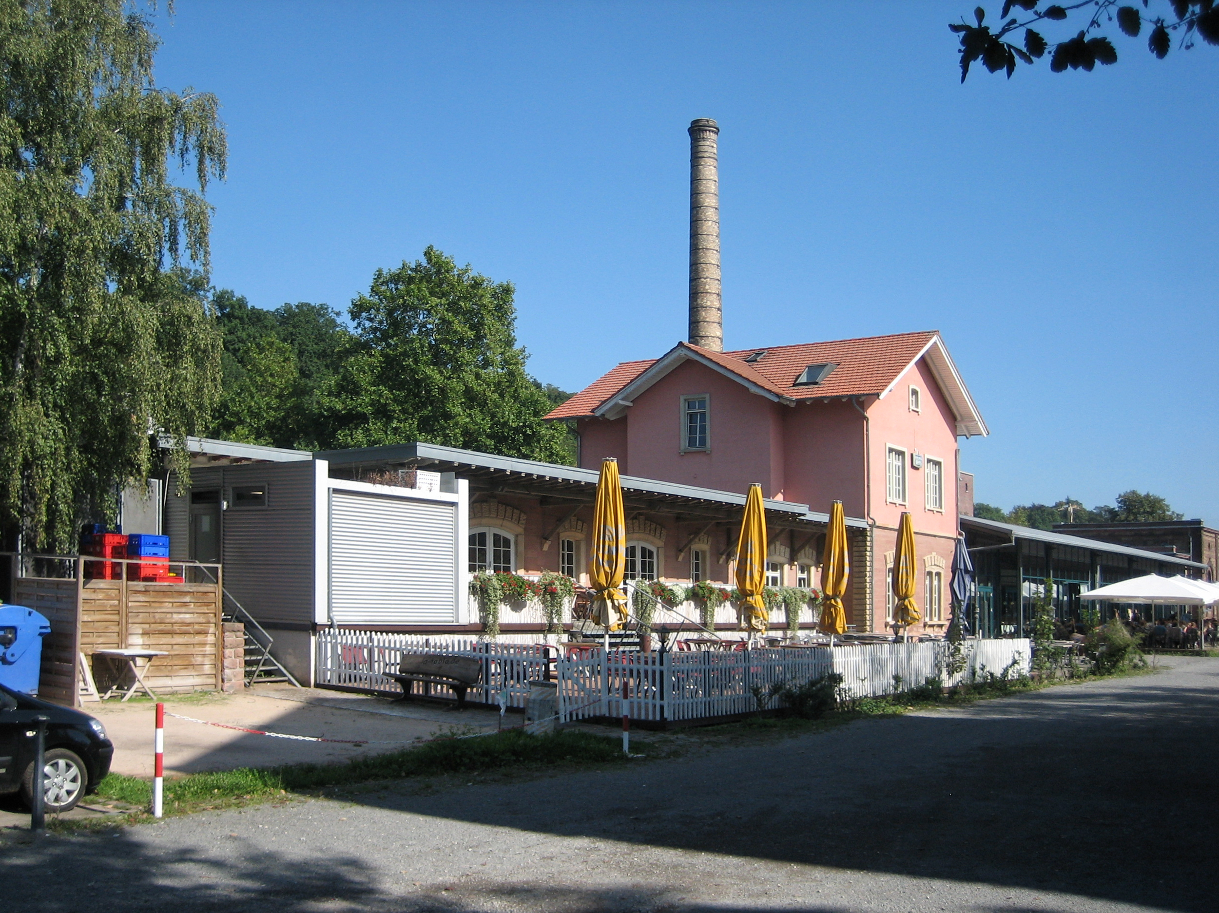 Empfangsgebäude des früheres Kaiserslauterer Westbahnhofs